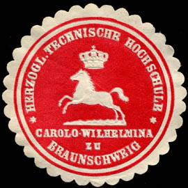 Sealing stamp Title: H. Technische Hochschule Carolo - Wilhelmina zu Braunschweig Description: rot, weiß, geprägt Place: Braunschweig size: 4 cm